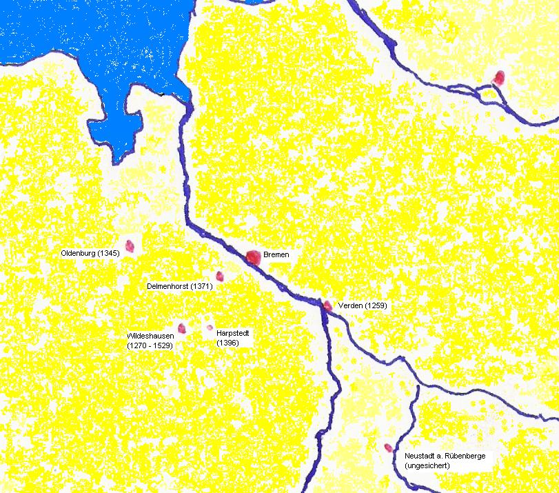 Karte der Bremer Stadtrechtsfamilie